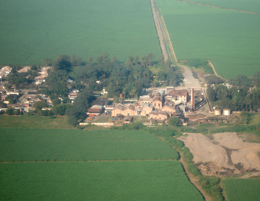 Ingenio Cruz Alta/Cruz Alta Sugar Mill in Colombres, Cruz Alta Department, Tucumán